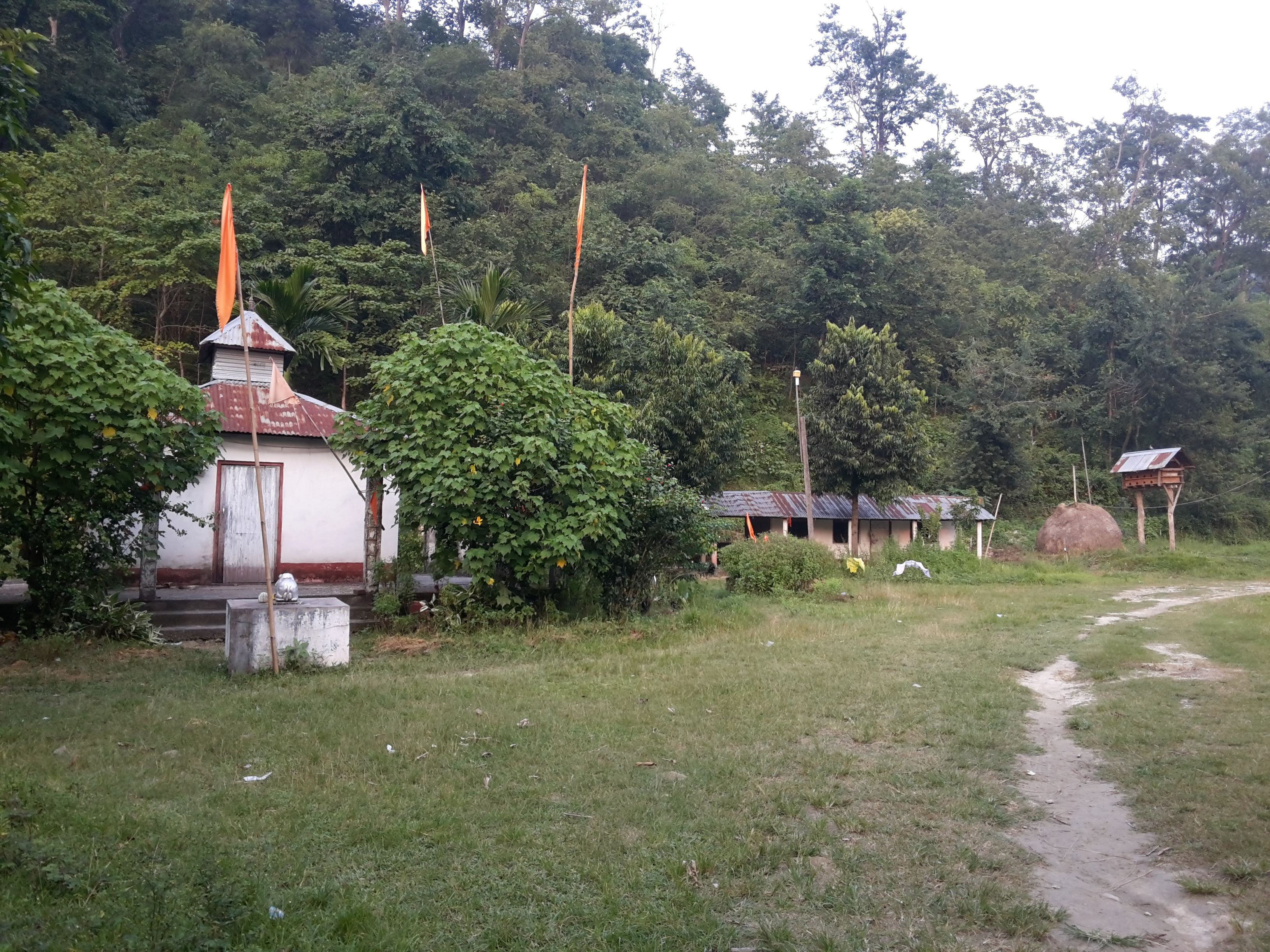 नेपाली: धनुषकोटि धामको दृश्य